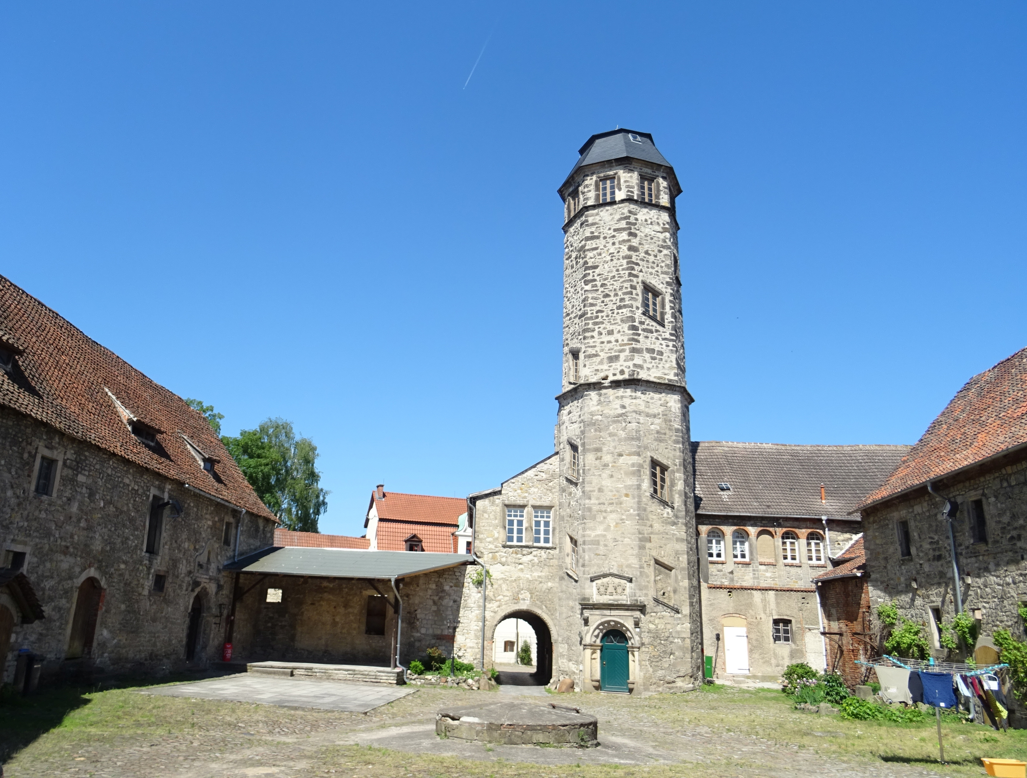 Schloss Ampfurt,hinterer Hof mit Schlossturm